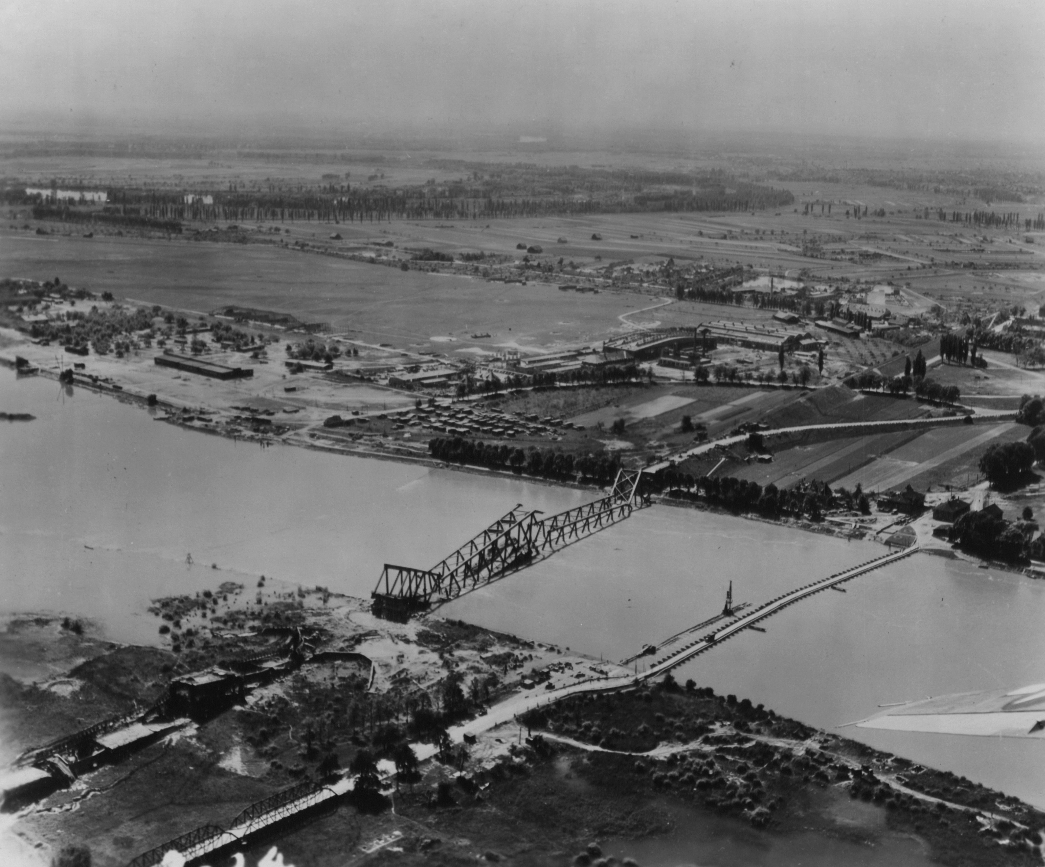 Luftaufnahme Flugplatz und Rheinbrücke Speyer